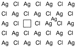 Frenkel defect in AgCl